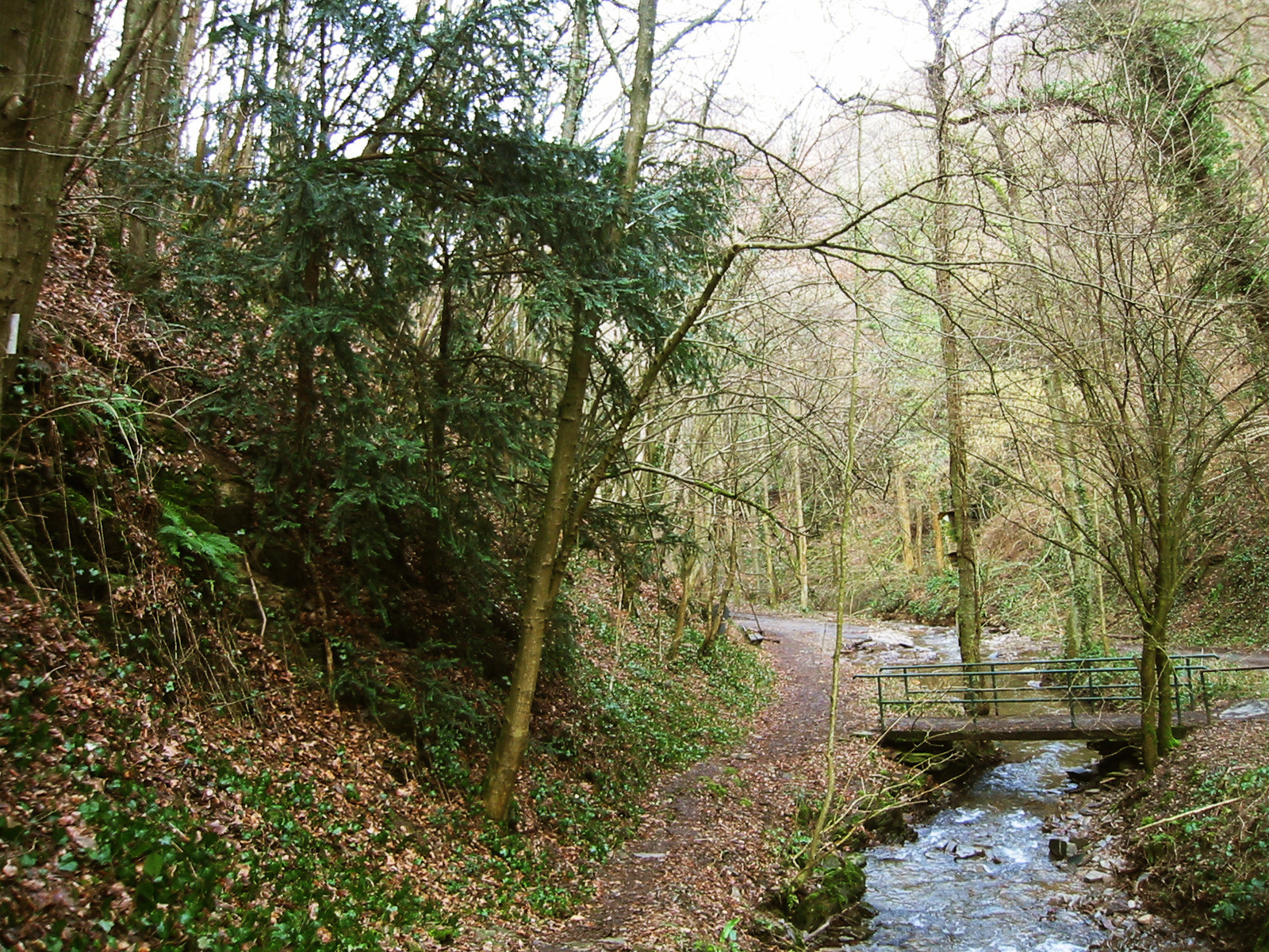 Exemplar einer Eibe im unteren Brodenbachtal.